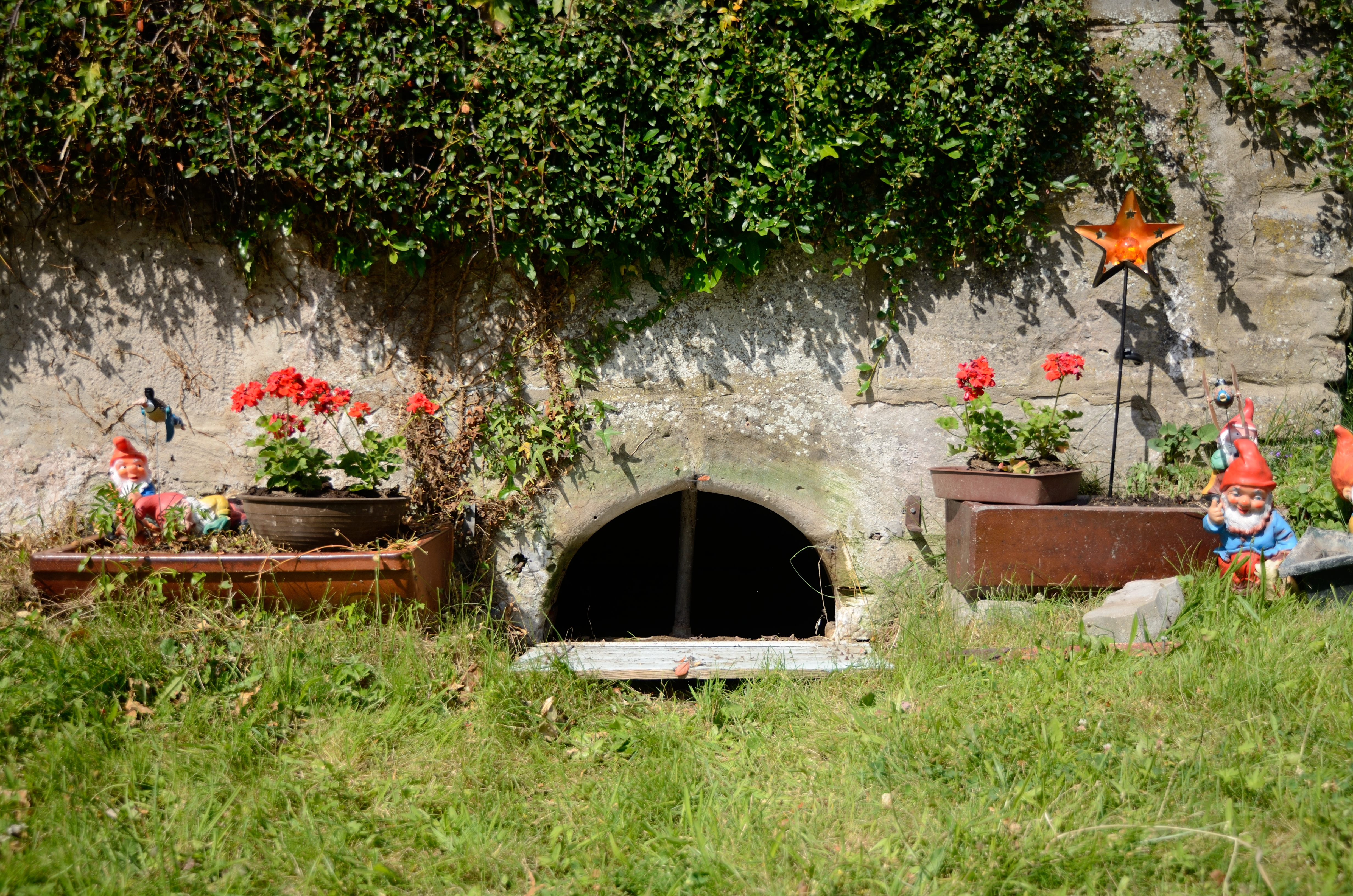 Das sogenannte Wendelsbad in Brodswinden auf dem Wendelsbuck